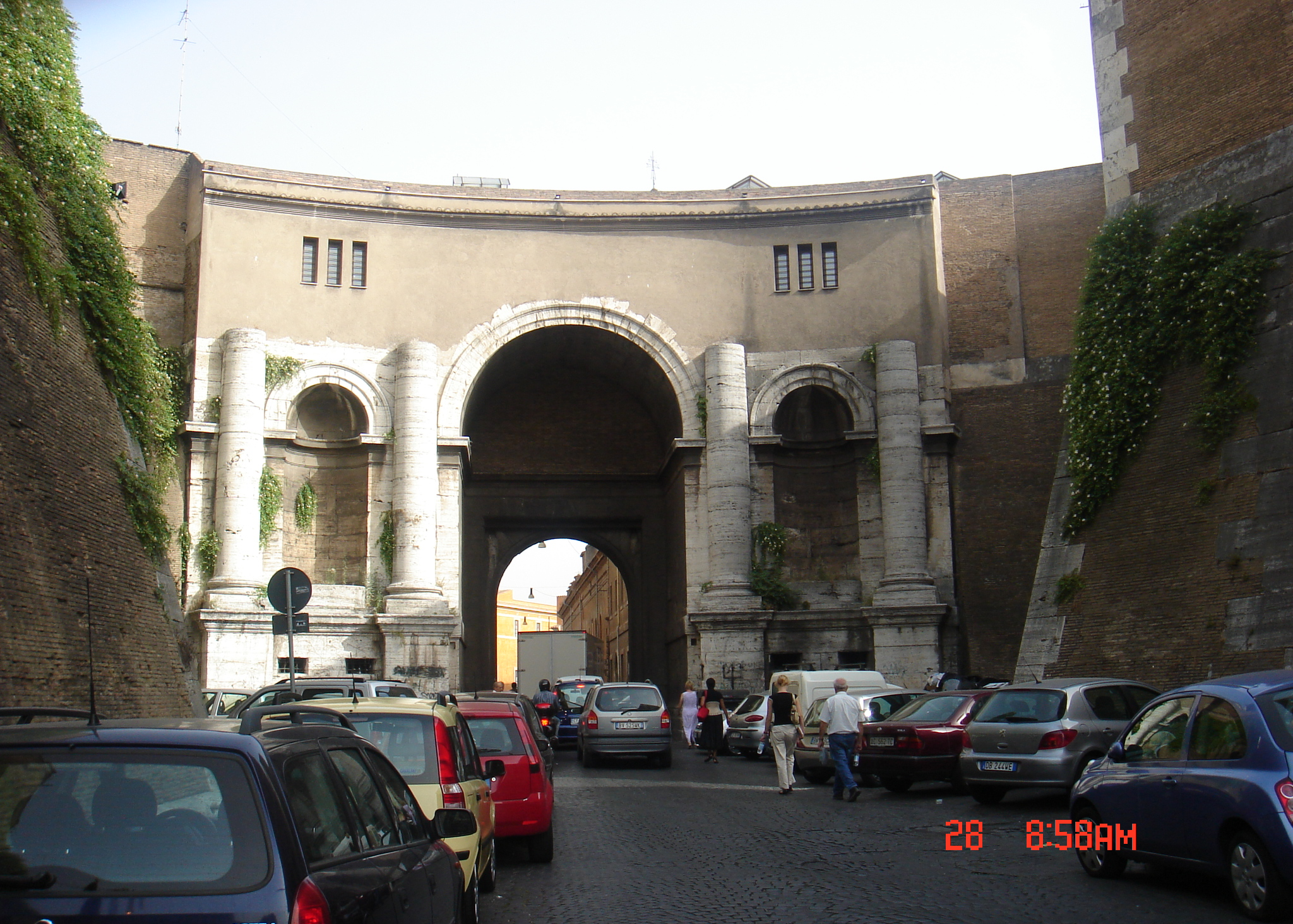 Roma , Porta Santo Spirito